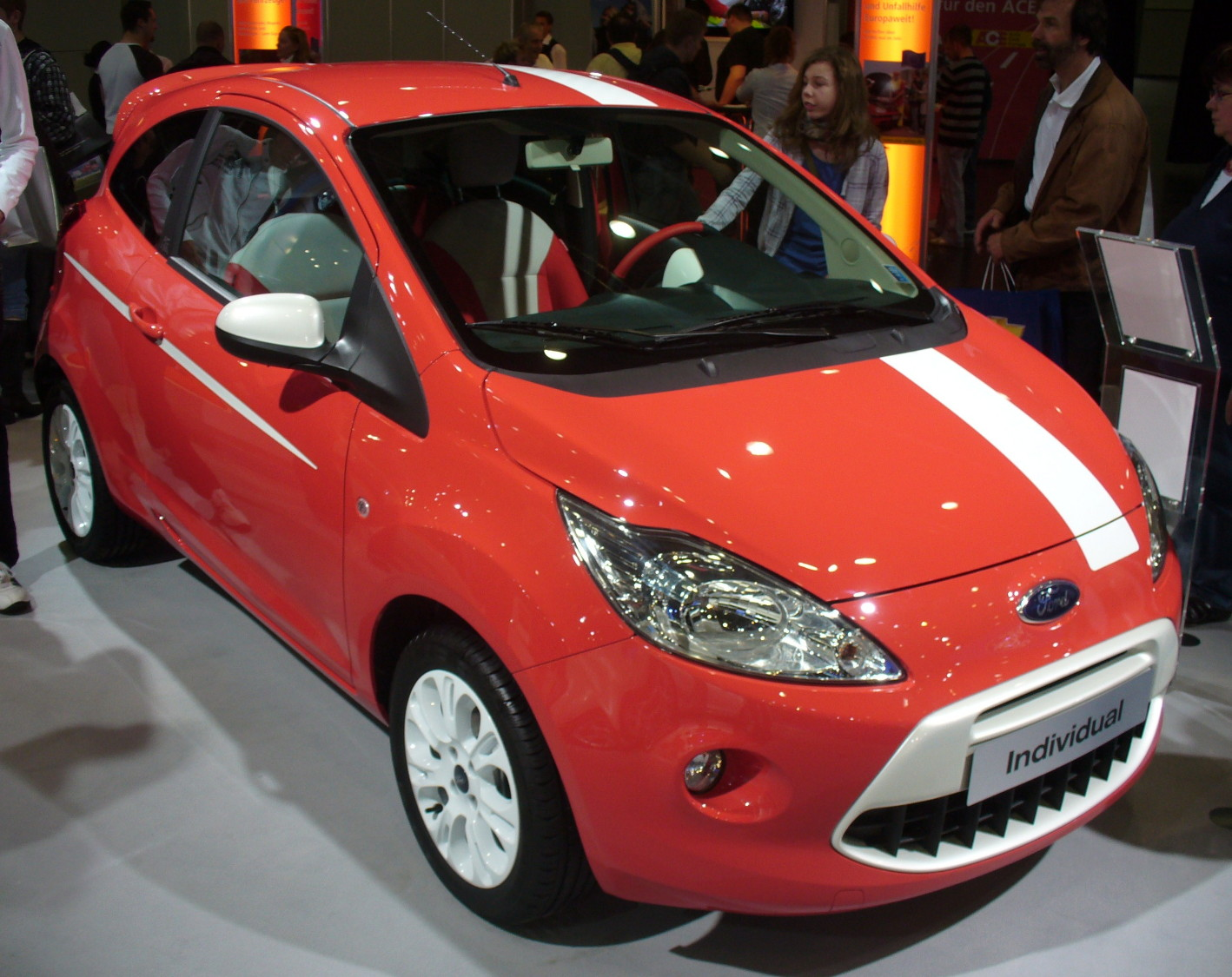 Ford Ka